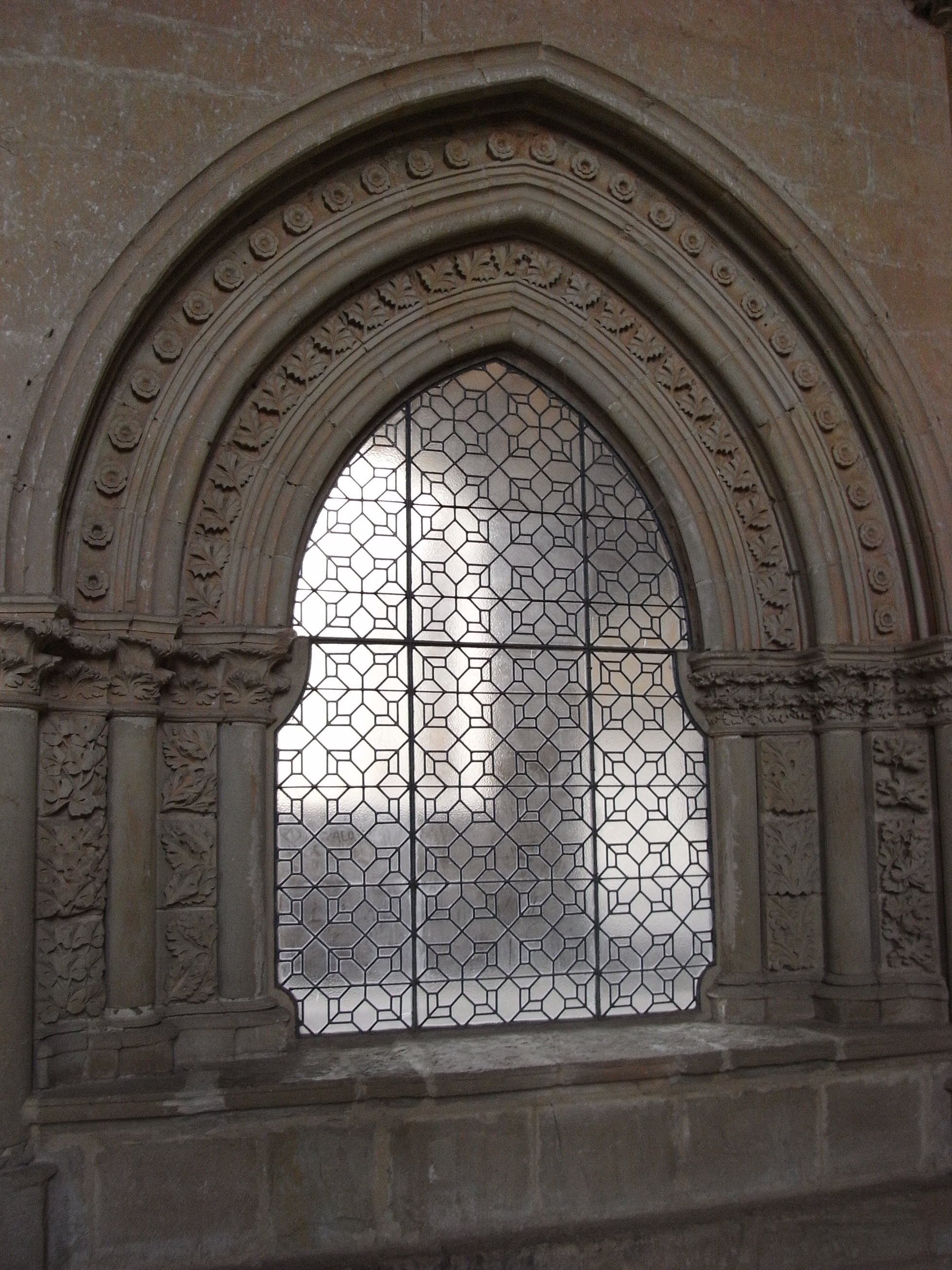 Ventana de la sala capitular del Monasterio de Cañas